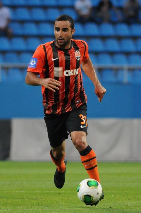 Ісмаїлі — бразильський футболіст, півзахисник